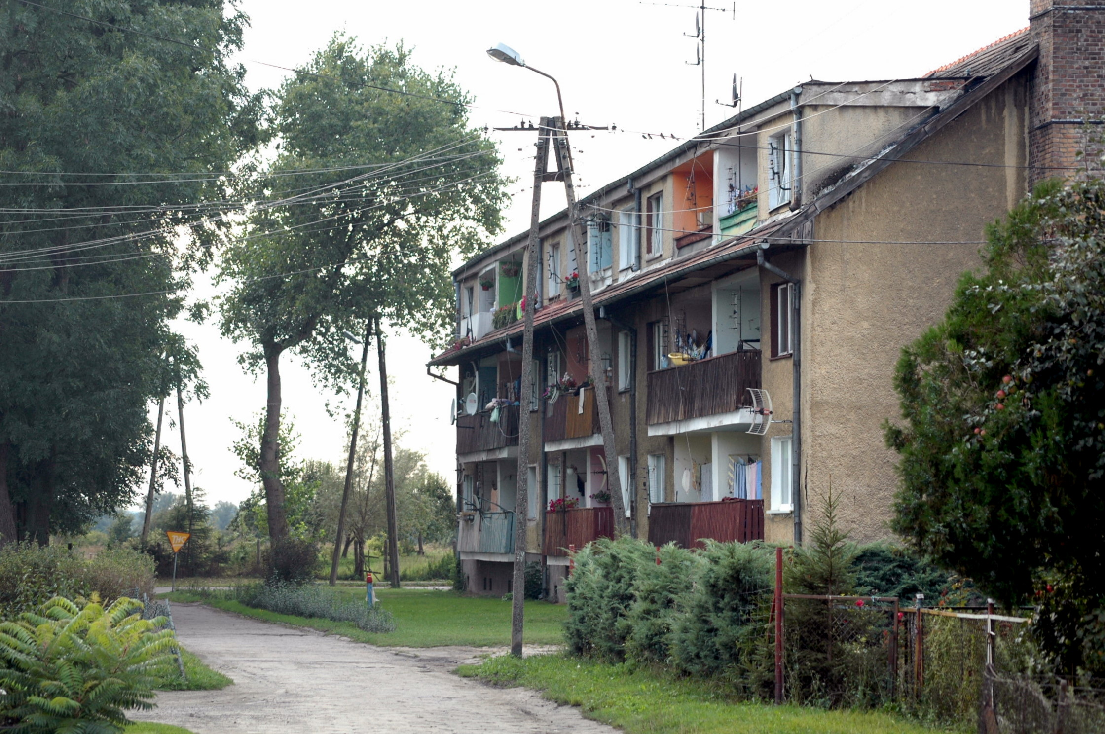 Blok w Uninie